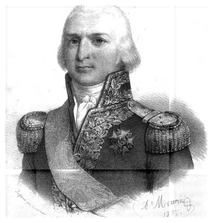 Justin Bonaventure Morard de Galles